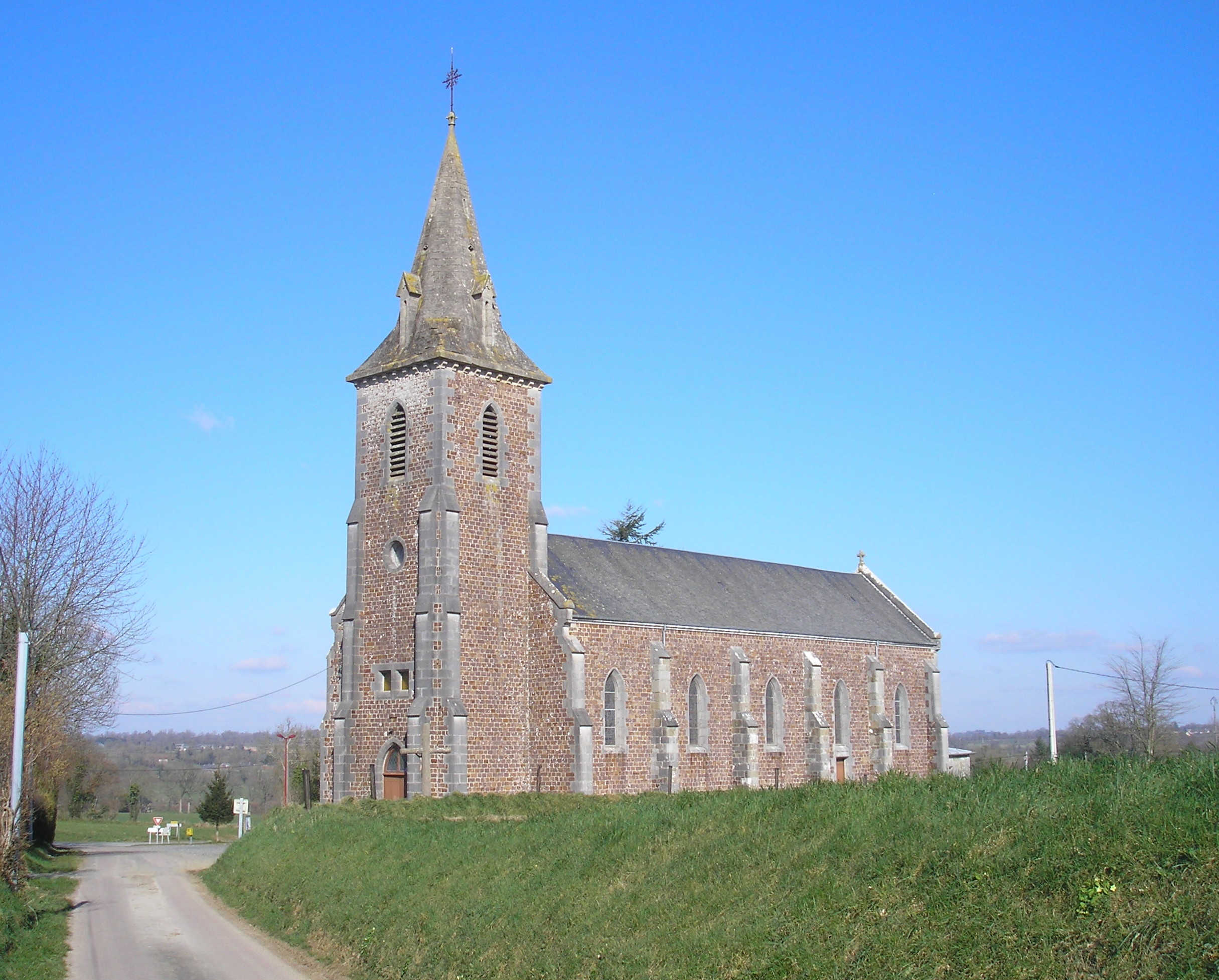 Guéhébert (Normandie, France). L'église Saint-Sulpice.